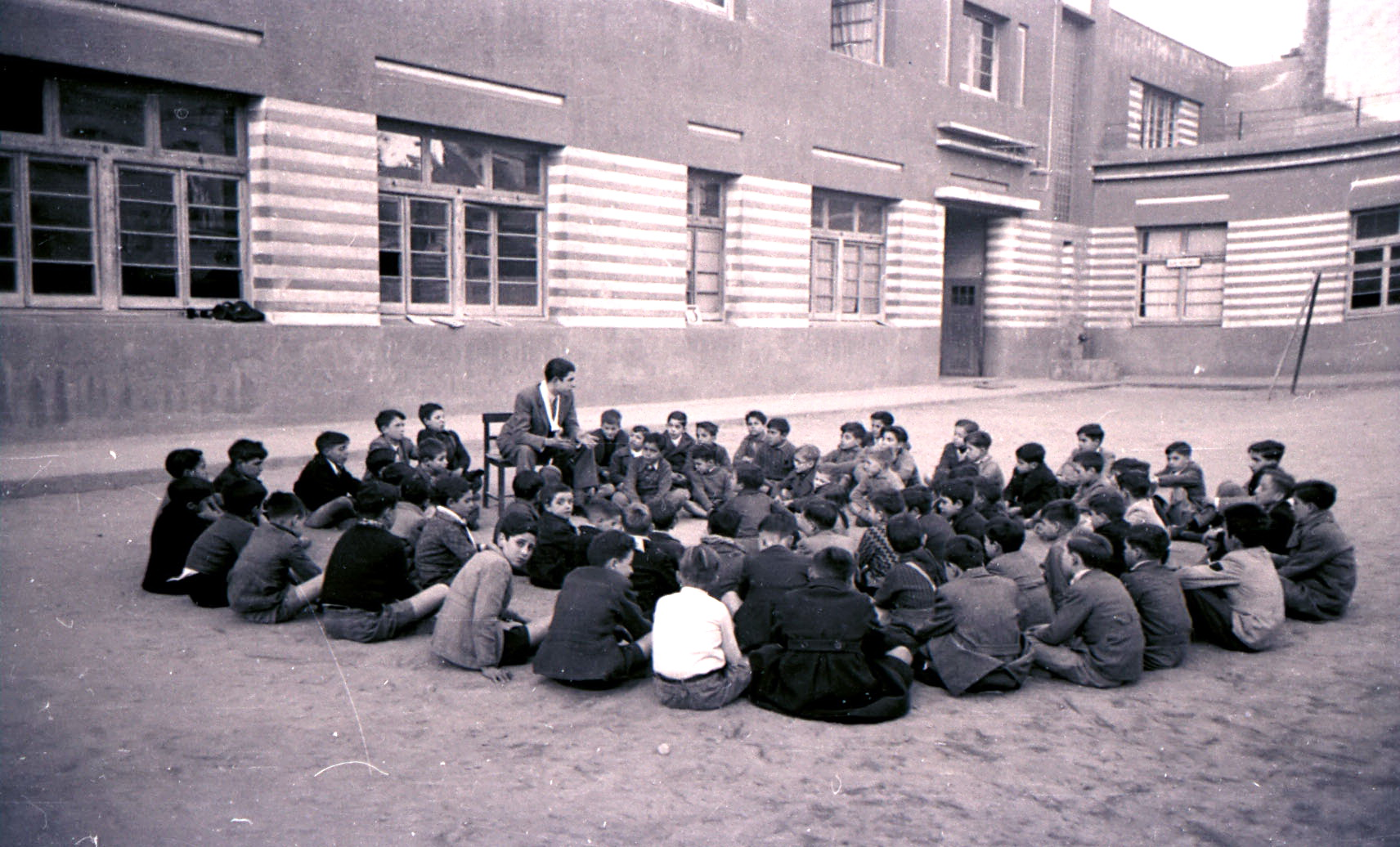 Congregant amb nens